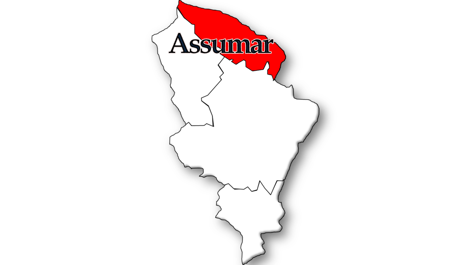 Evolução da População